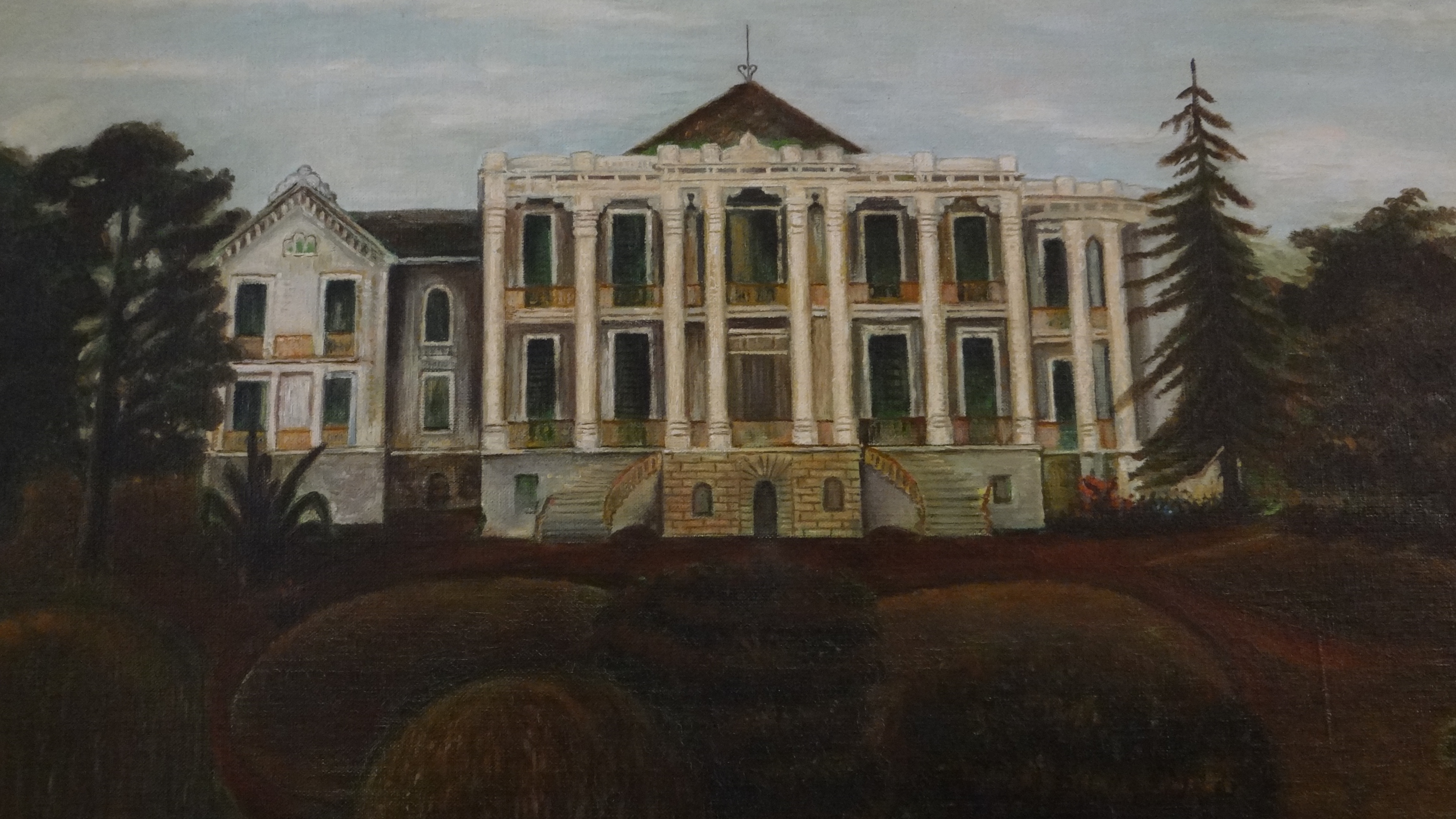 Nottoway Plantataion